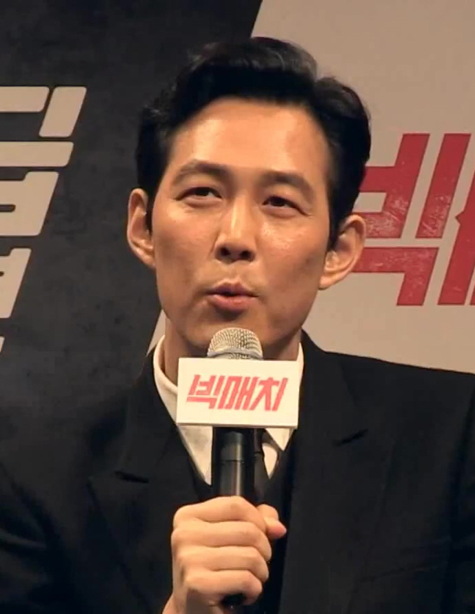 (빅매치) 제작보고회 말.말.말 영상